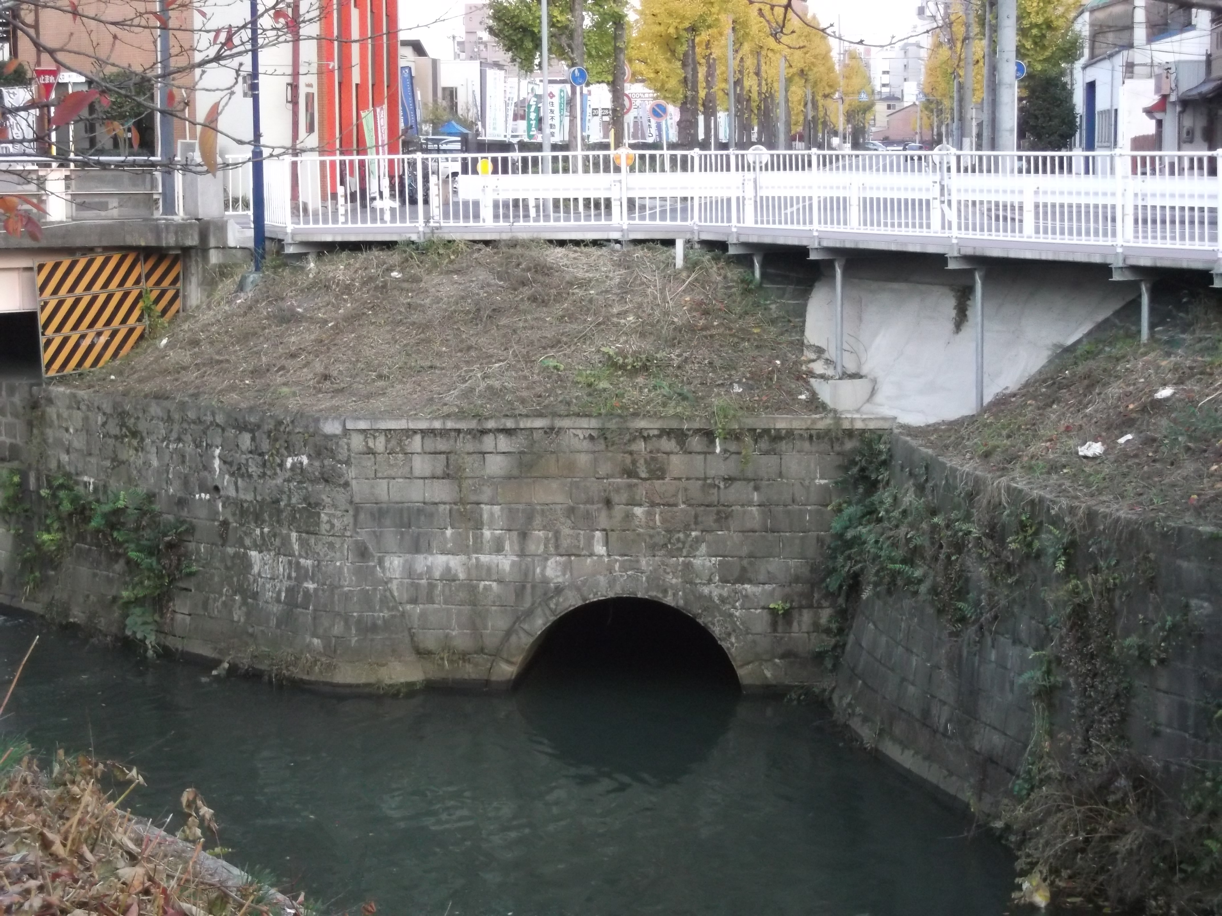 名古屋市北区志賀町の下水道大幸幹線（旧大幸川）出口